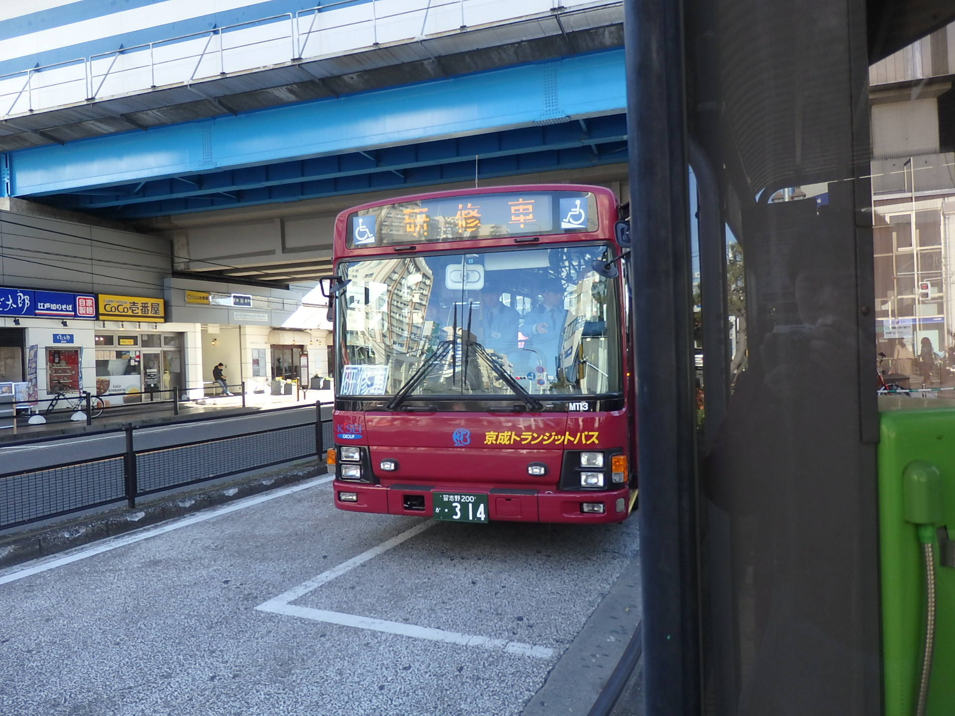 京成トランジットバスM113号車の研修運用。